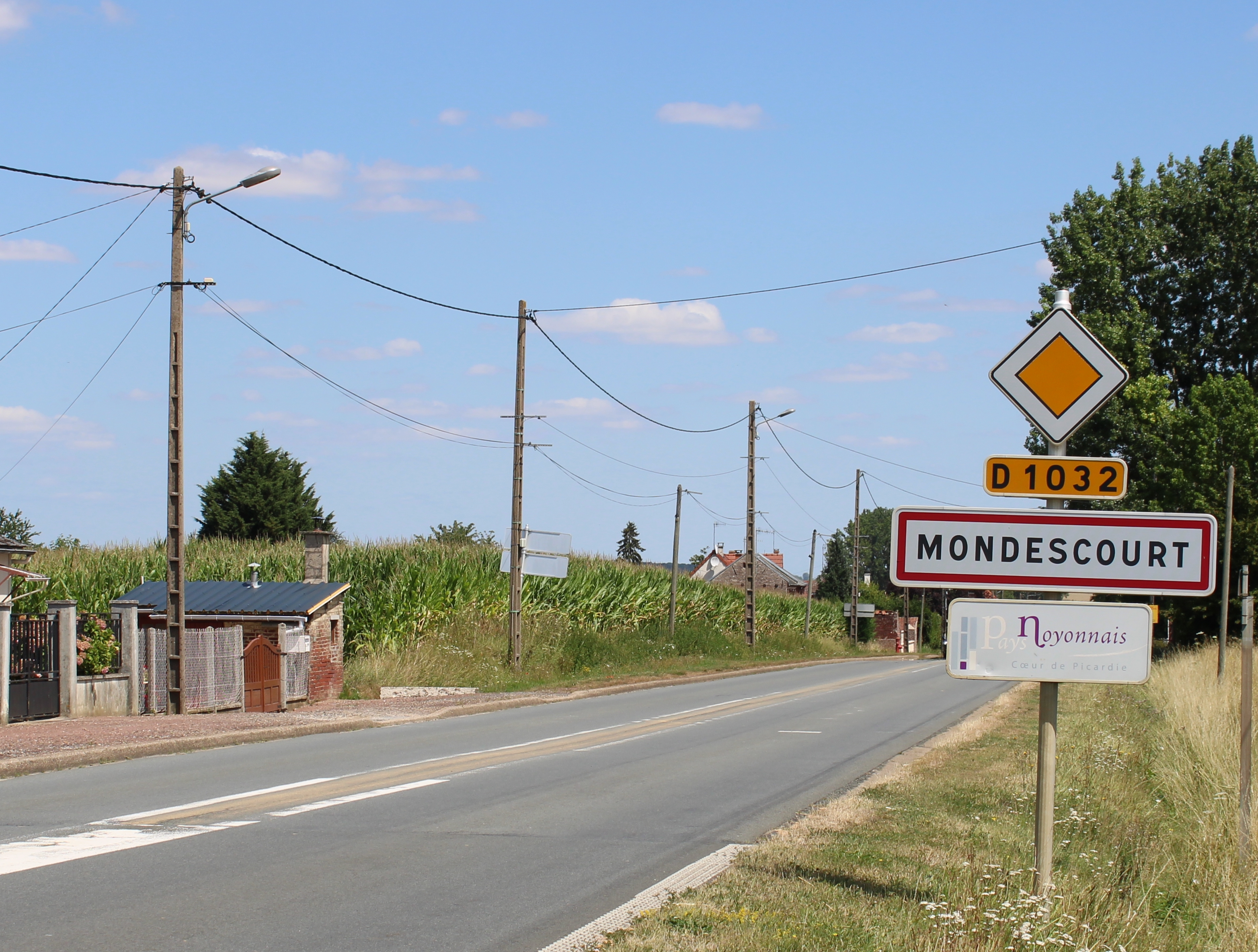 Entrée du village dur la D1032 ex RN32